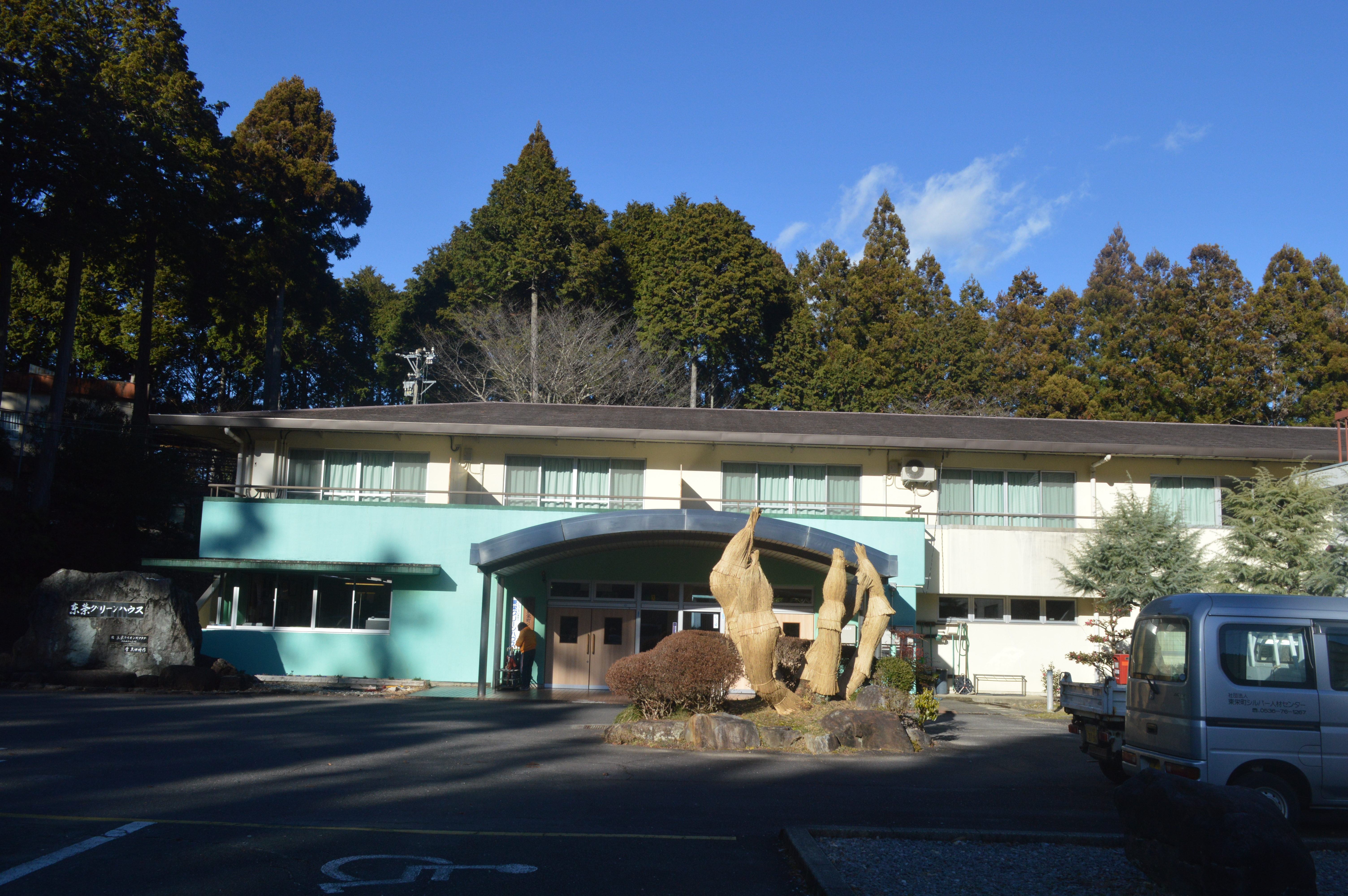 愛知県北設楽郡東栄町の町営宿泊施設である東栄グリーンハウス。